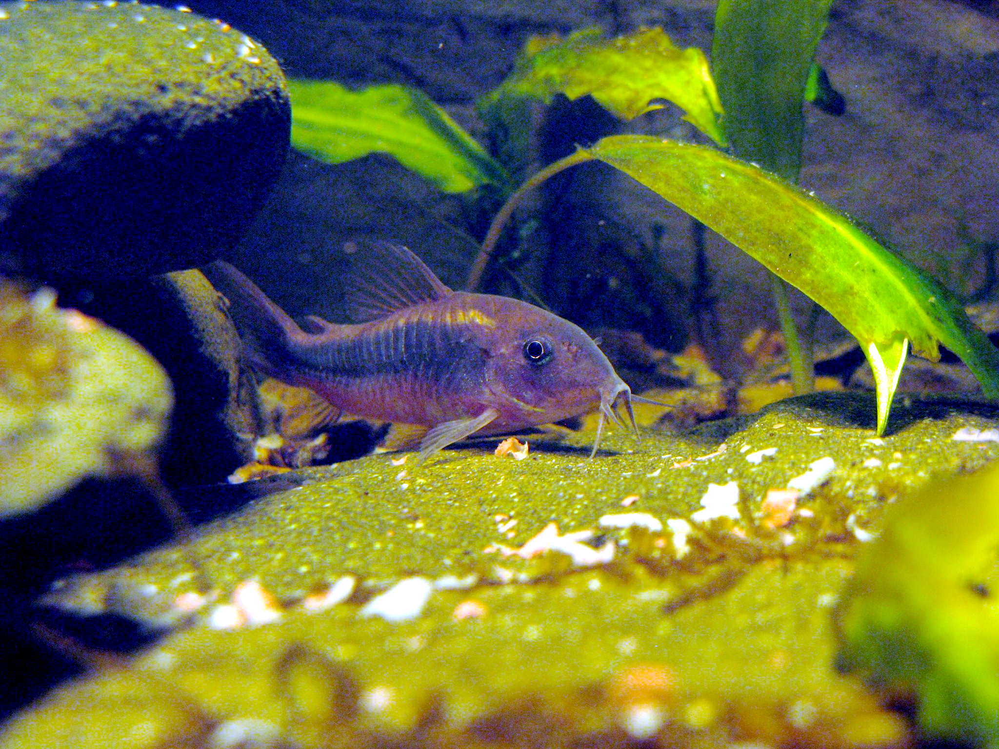 Pancéřníček zelená